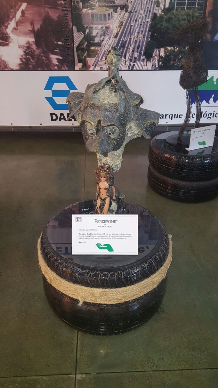 Escultura composta por materiais recicláveis como garrafa, sacos plásticos, peças e pedaços de caixas plásticas, brinquedos usados, papelão, cola quente, tinta de tecido, glitter, entre outros